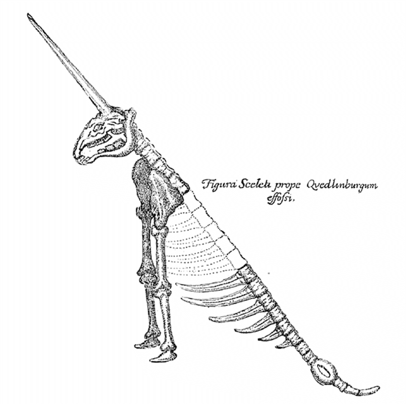 Einhorndarstellung aus der Protogaea von G.W.Leibniz (gedruckt 1749)